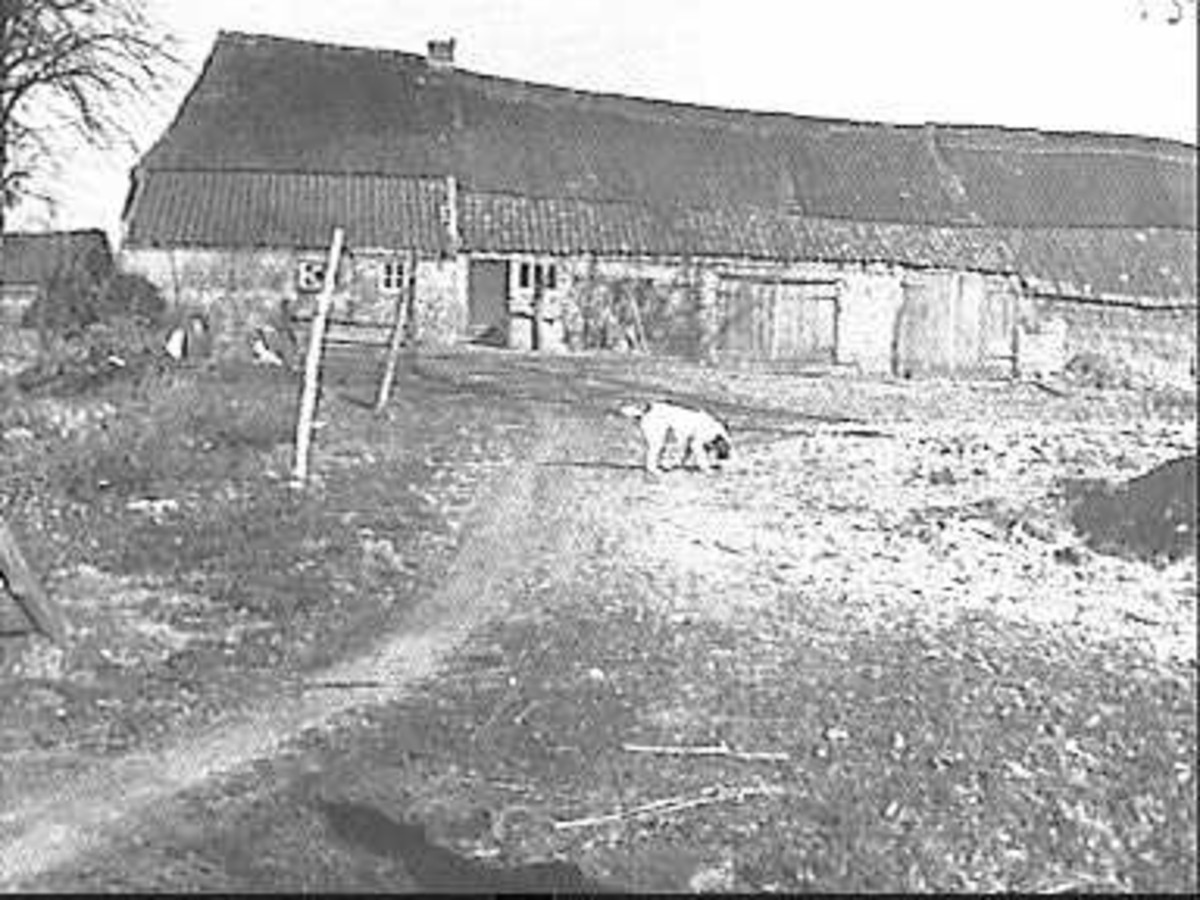 Strubol: zijgevel zie dia 4915 (opmerking: Deze afbeelding hebben wij helaas alleen in deze lage resolutie.)